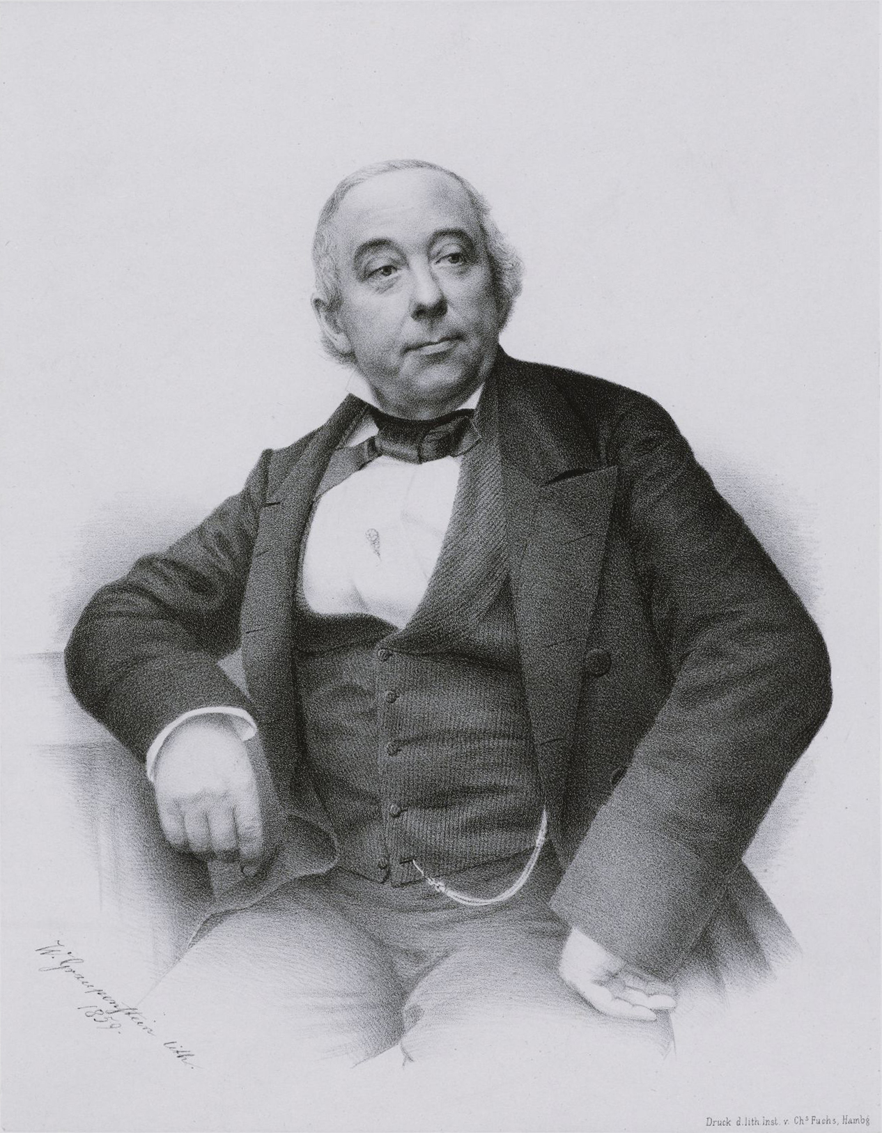 Porträt Johann Heinrich Boeckmann von Friedrich Wilhelm Graupenstein